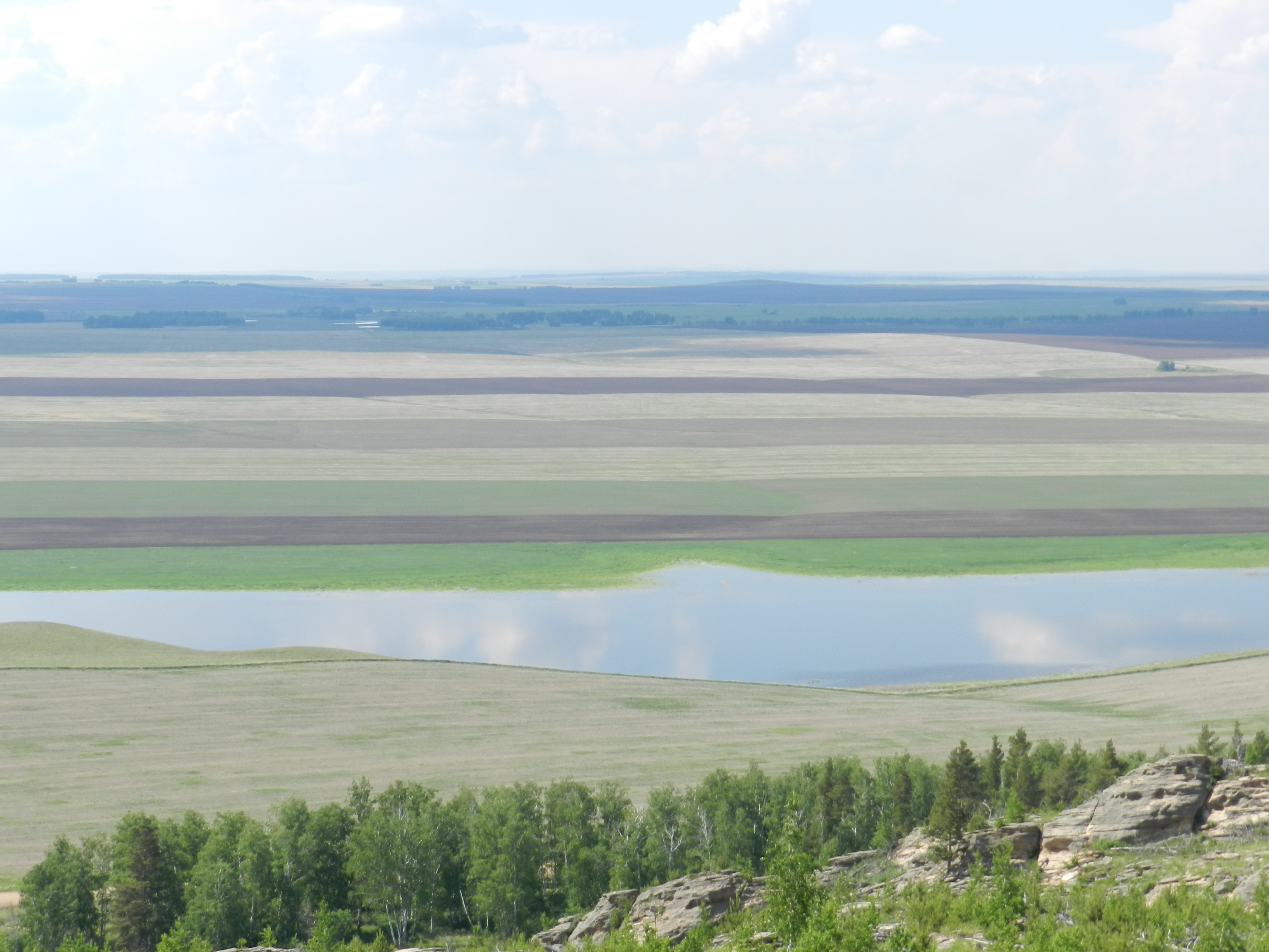 Черноборский заказник, Чесменский район This image is related to the protected area of Russia number 7410314